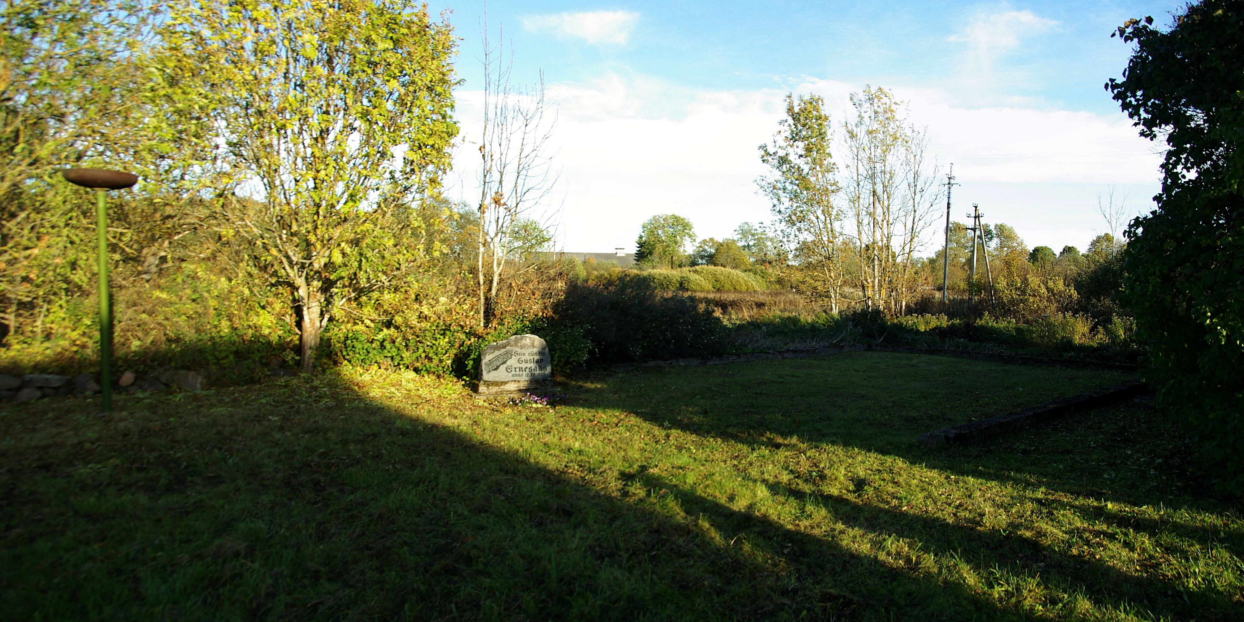 Harjumaa,Peningi vald